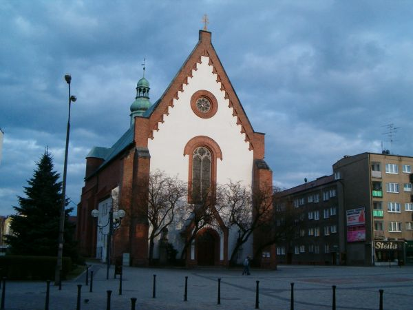 kościół pw. św. Jakuba Starszego